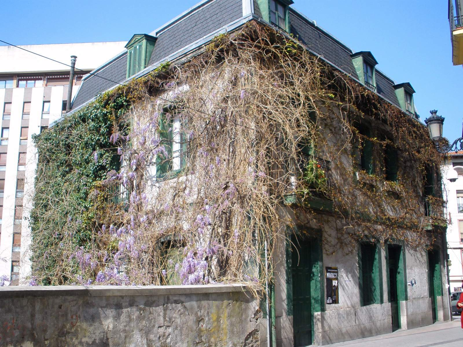 Ordizia, Guipúzcoa